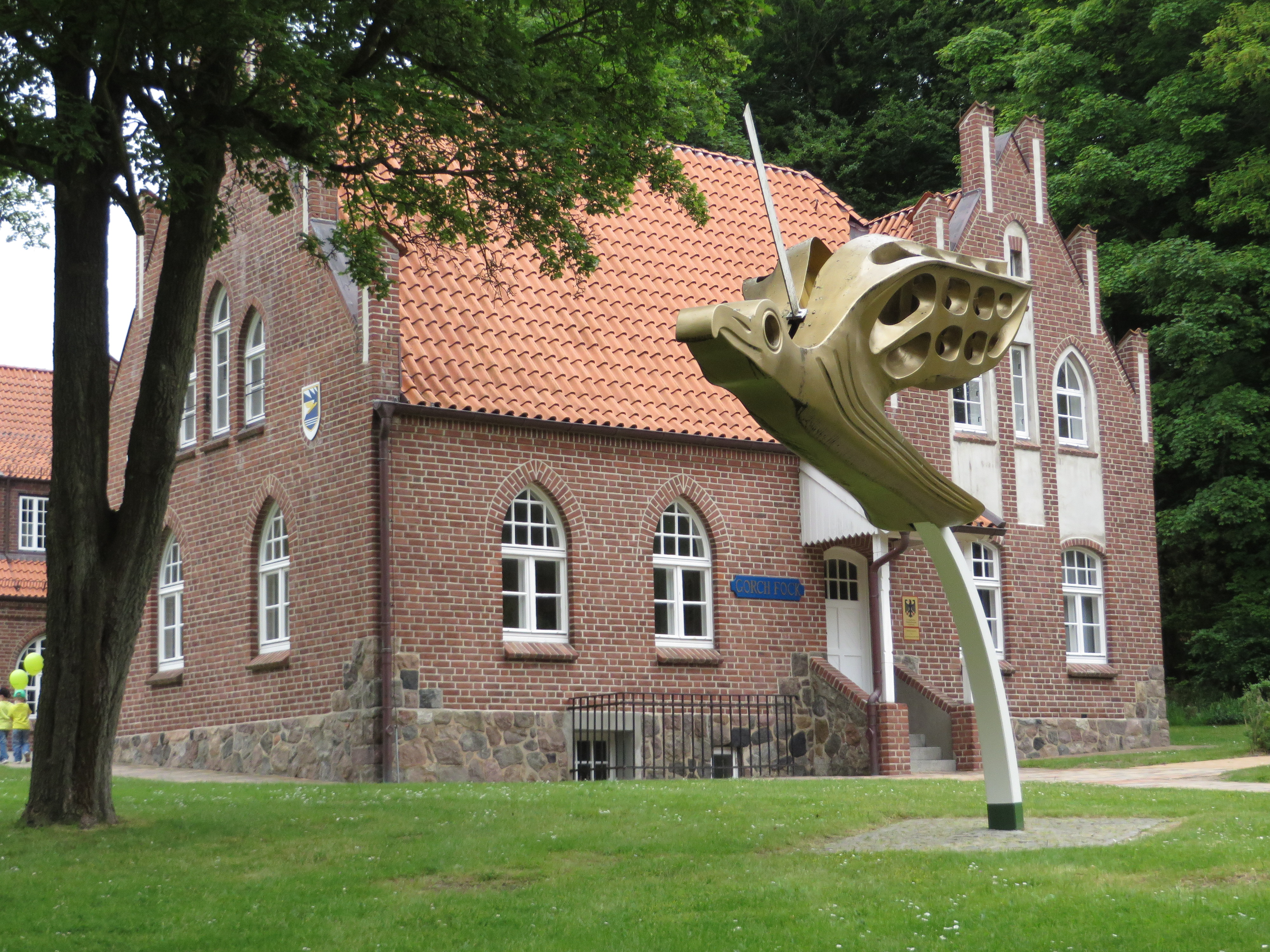 Galionsfigur der Gorch Fock vor dem Gorch-Fock-Haus (Flensburg-Mürwik Juni 2015), Bild 01